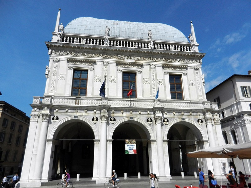 Brescia - Loggia